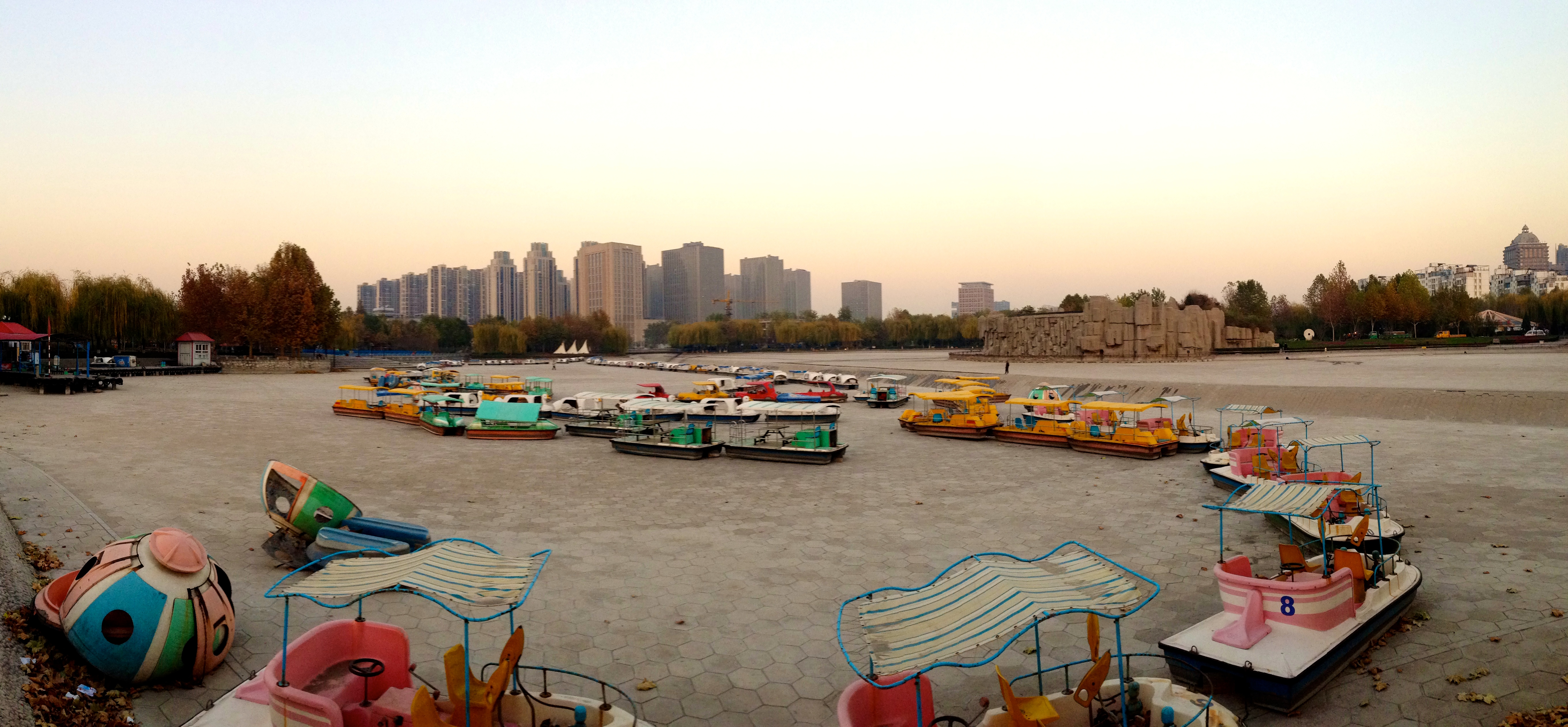 Yuhua, Shijiazhuang, Hebei, China